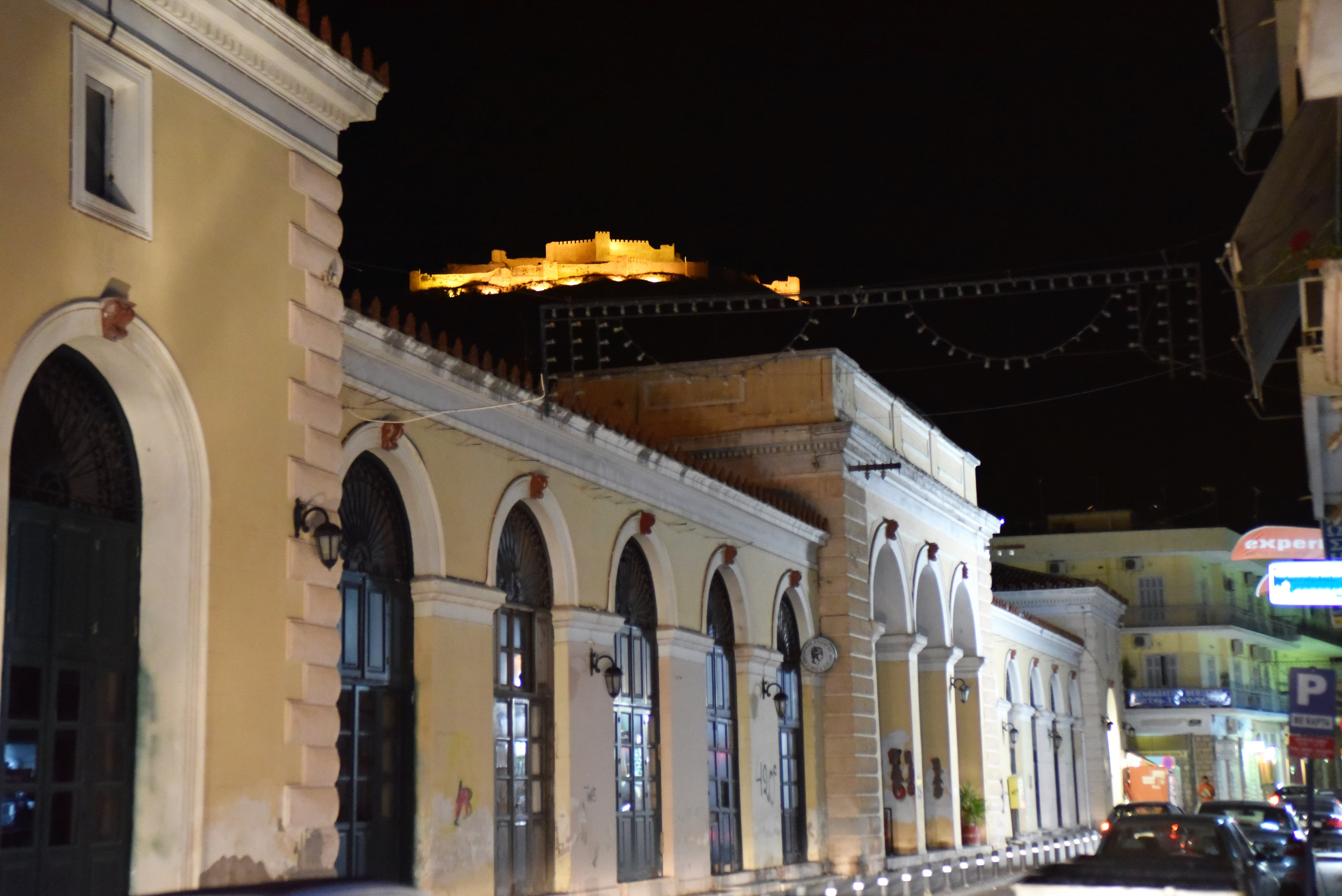 Δημοτική Αγορά Άργους«Δημοτική Αγορά Άργους»